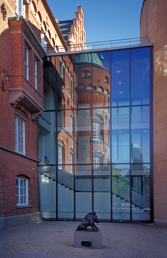 Den glasade passagen mellan Slottet och Cylindern.